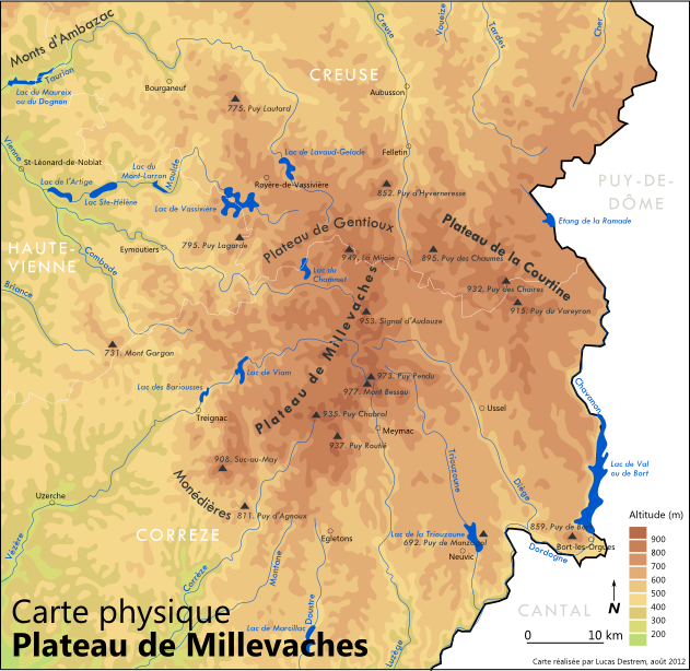 Carte topographique du plateau de Millevaches et espaces avoisinants, au sein de la région Limousin.